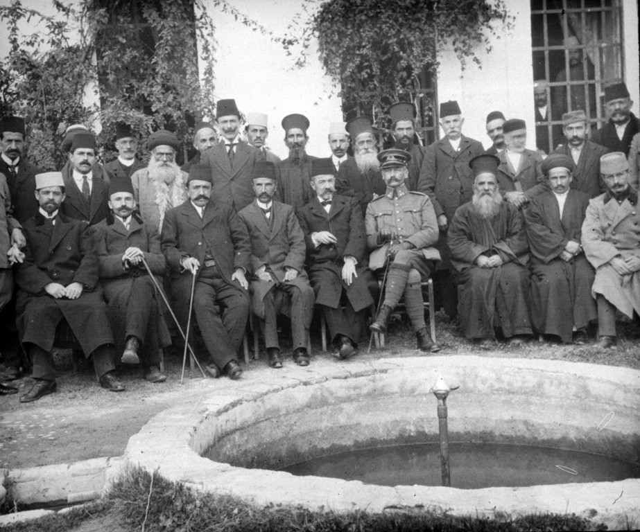 DMM E07 Gathering in Elbasan. Sitting from left to right: 1. Dervish Hima, 2. Lef Nosi, 3. Ali Agjah Bey of Elbasan, 4. ?, 5. Aqif Pasha Biçakçiu of Elbasan, 6. General De Veer. Standing from left to right: 1. ?, 2. Emin Matraxhiu, 3. ?, 4. ?, 5. ?, 6. Andon Beça (tallest), 7. ?, 8. ?, 9. Filip Noga. 1913-1914. 24 December 1913. / Tubim në Elbasan. Ulur nga e majta në të djathtë: 1. Dervish Hima, 2. Lef Nosi, 3. Ali Agjah bej Elbasani, 4. ?, 5. Aqif pashë Biçakçiu i Elbasanit, 6. Gjenerali De Veer. Në këmbë nga e majta në të djathtë: 1. ?, 2. Emin Matraxhiu, 3. ?, 4. ?, 5. ?, 6. Andon Beça (më I madhi), 7. ?, 8. ?, 9. Filip Noga. 24 dhjetor 1913.